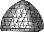 Croquis du Grand Mogol d'après Tavernier